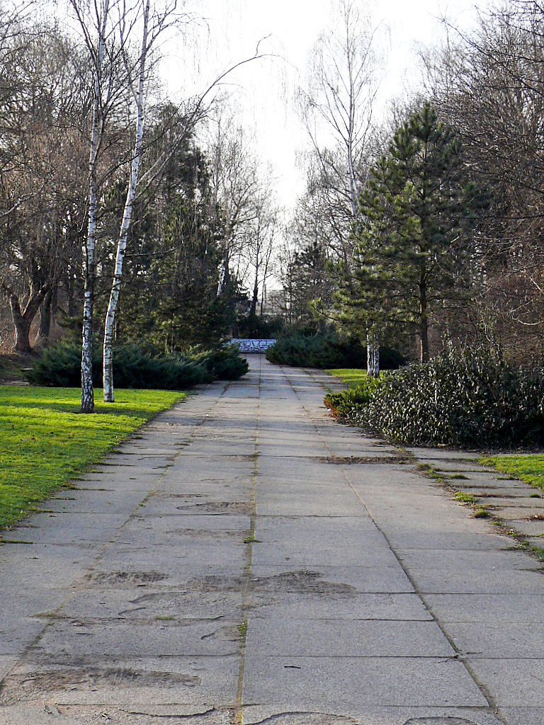 Ehemaliger Thälmann-Ehrenhain im Mariannenpark Leipzig.